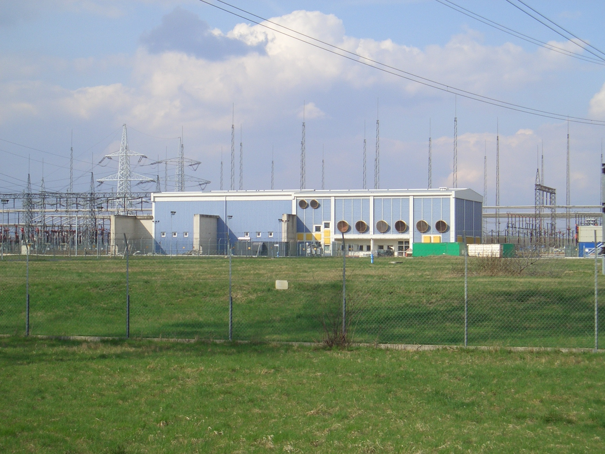 Umspannwerk Wien-Südost, Ehemalige GKK Konverterhalle, vom Süden aufgenommen. Erkennbar links die beiden Buchten für die Stromrichtertransformatoren.